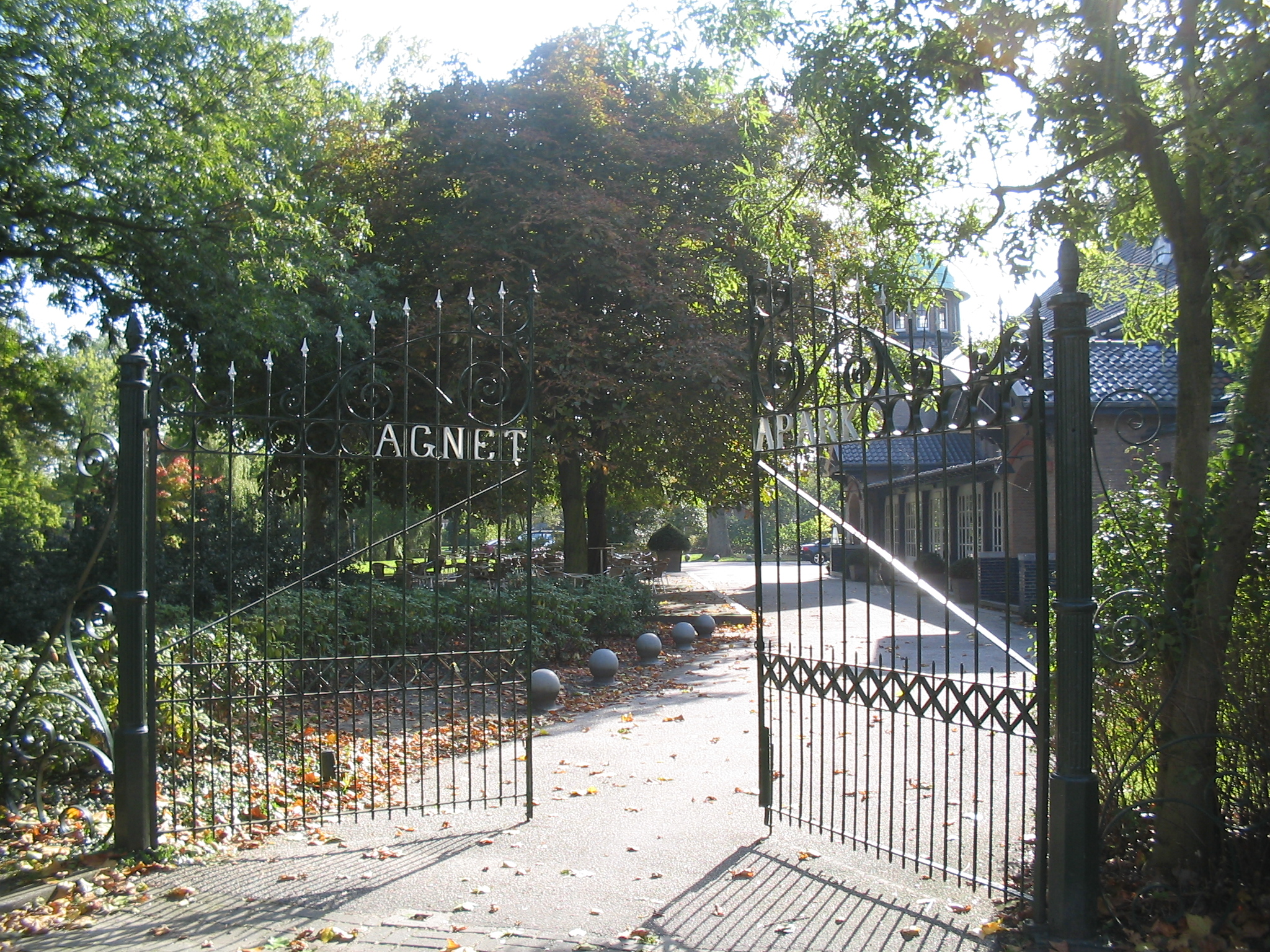 Agnetapark, Delft, 18 oktober 2005